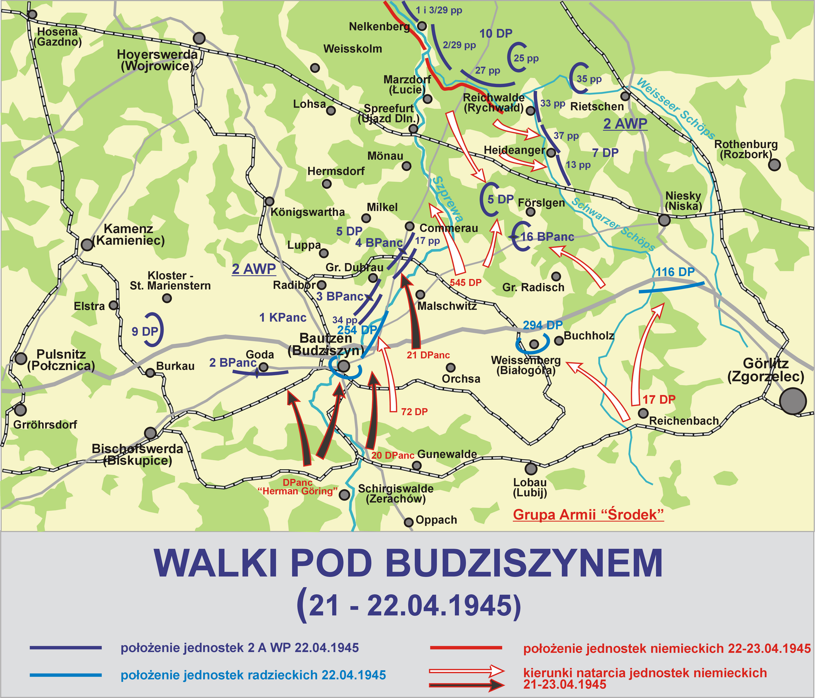 Walki pod Budziszynem (Bautzen) - 21-22.04.1945